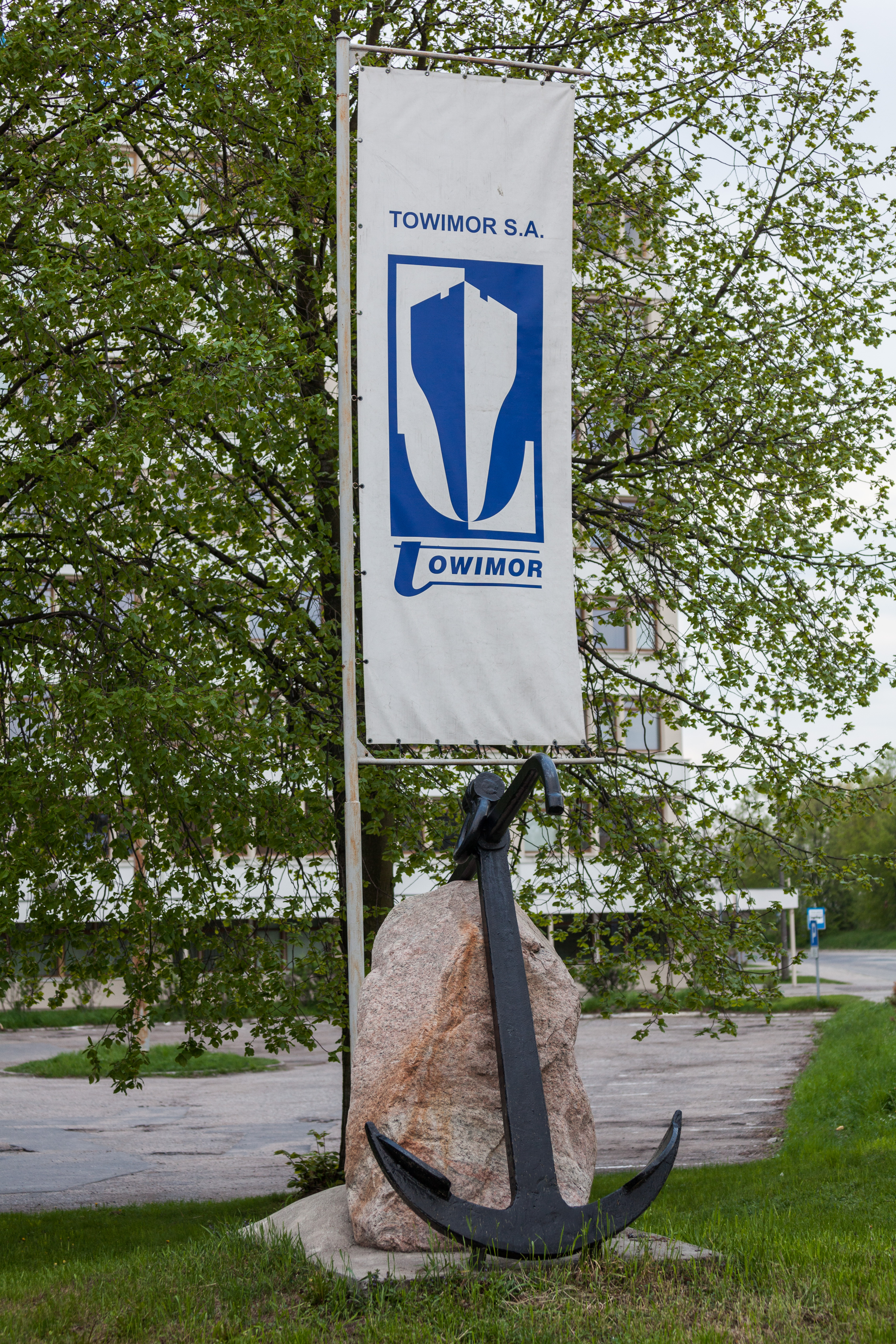 Toruń, logo zakładów Towimor i kamień z kotwicą przed biurowcem, ul. Droga Starotoruńska.